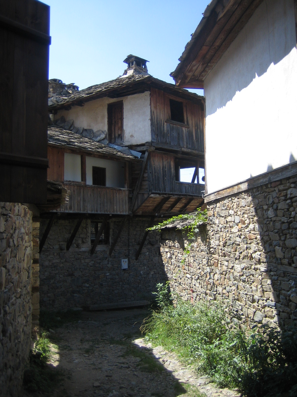 rue typique de Kovatchevitsa (Bulgarie)